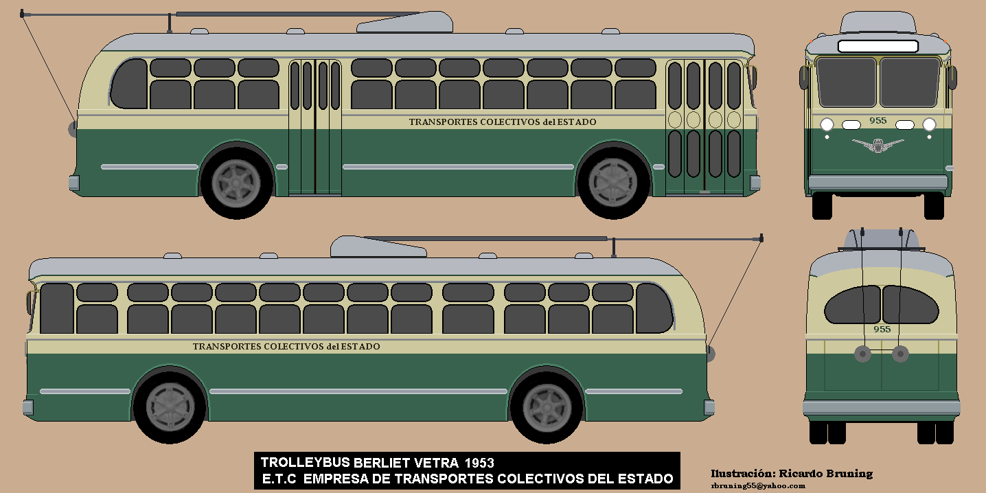 Ilustración de trolebus Berliet Vetra utilizado por la Empresa de Transportes Colectivos del Estado de Chile